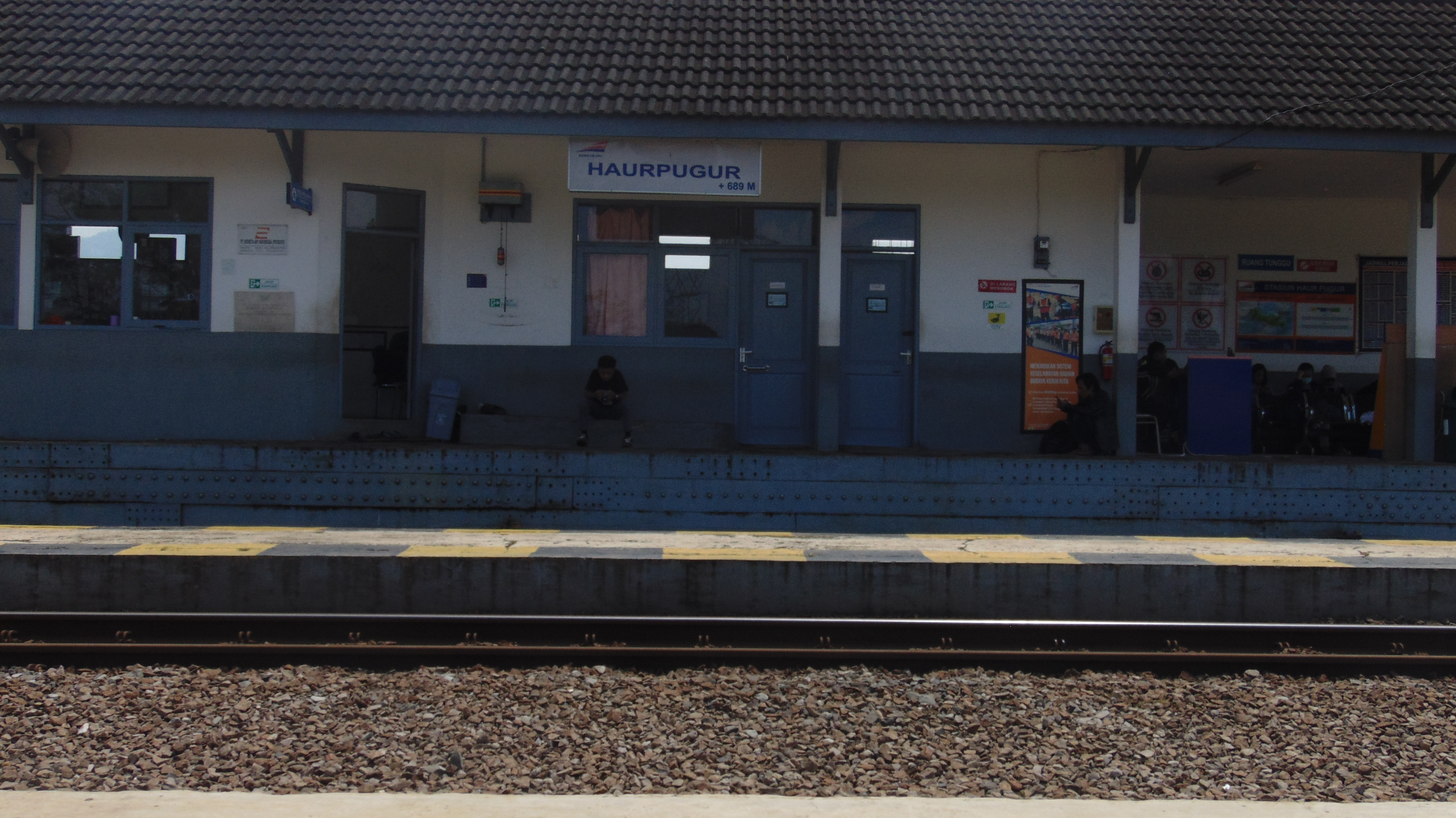 Bangunan Utama HRP